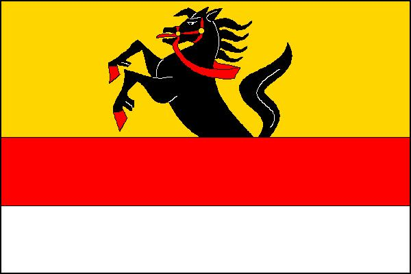 Vlajka obce Velenov